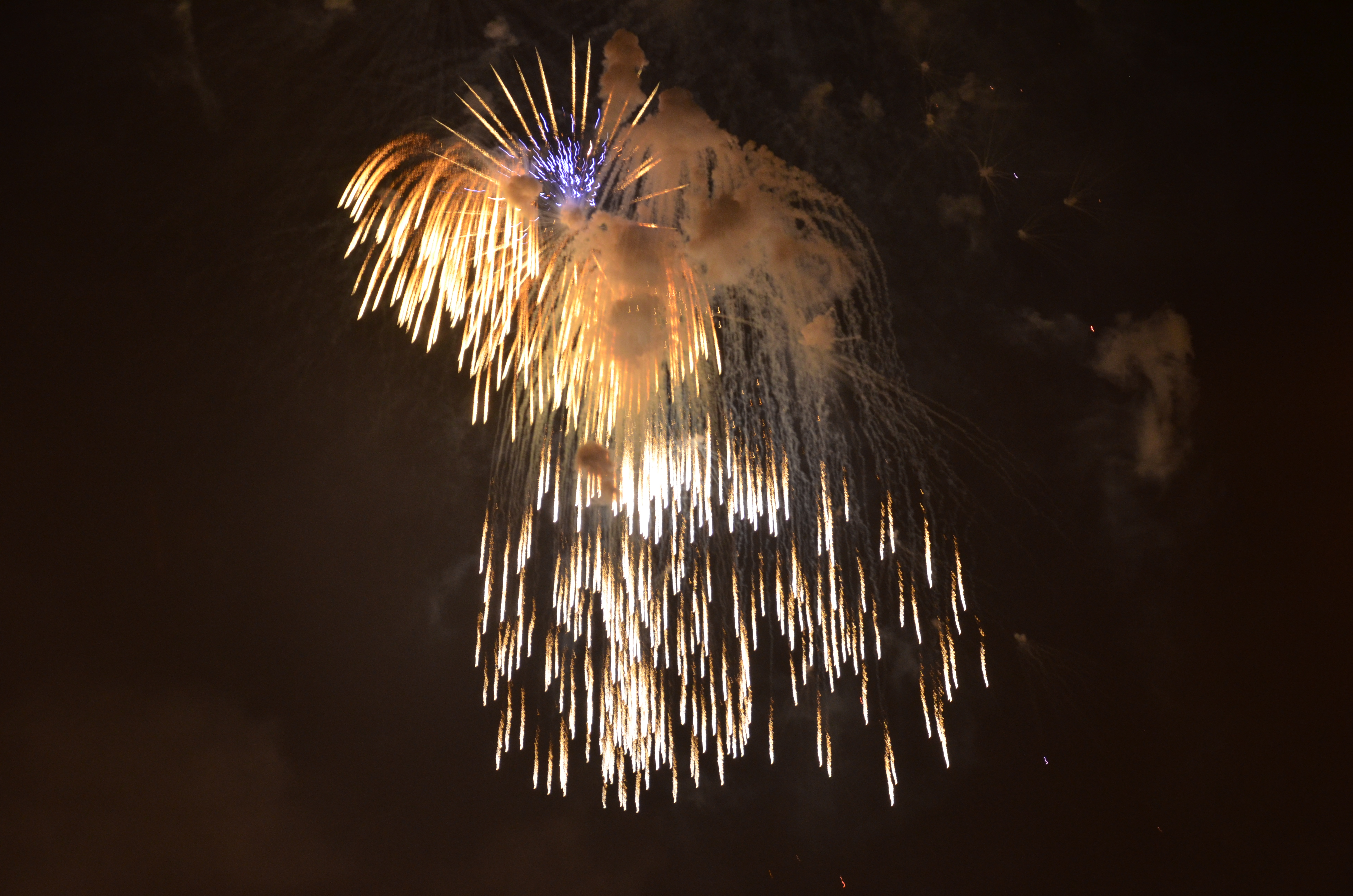 الالعاب النارية في سماء الرياض عيد الفطر 1433